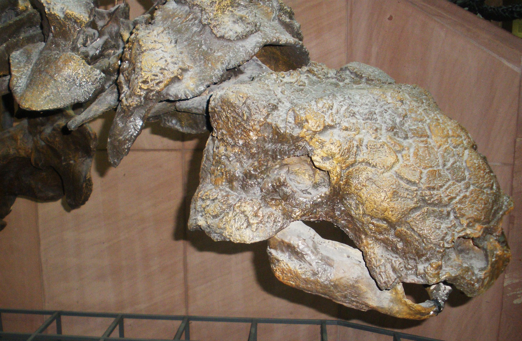 Cast of Euoplocephalus skull ROM 1930, an extinct ankylosaurian- Took the photo at Senckenberg Museum of Frankfurt